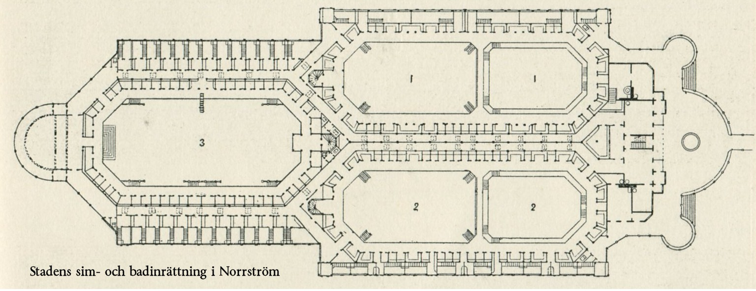 Ritning över Strömbadet från 1884